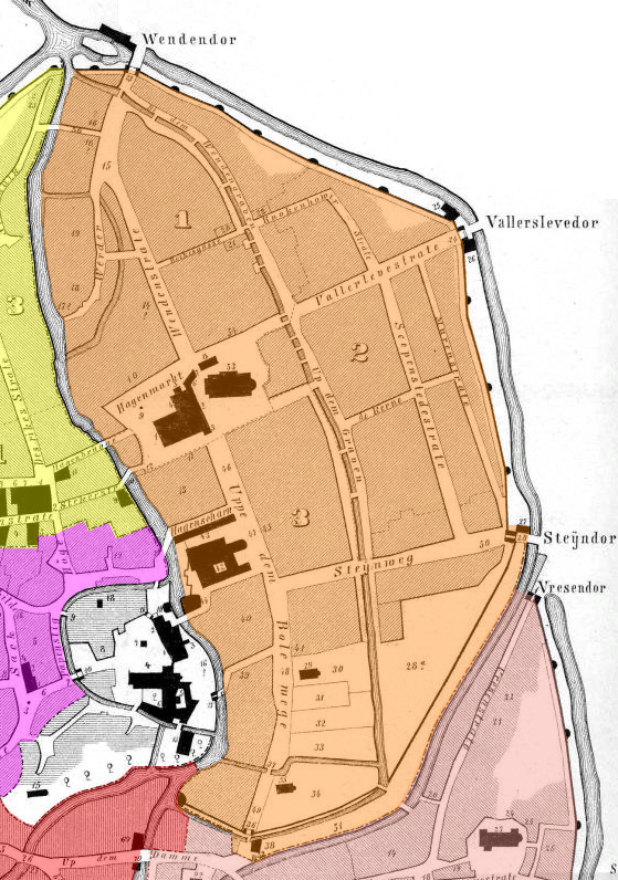 Der Hagen um 1400 auf einer historischen Karte (Orange eingezeichnet)